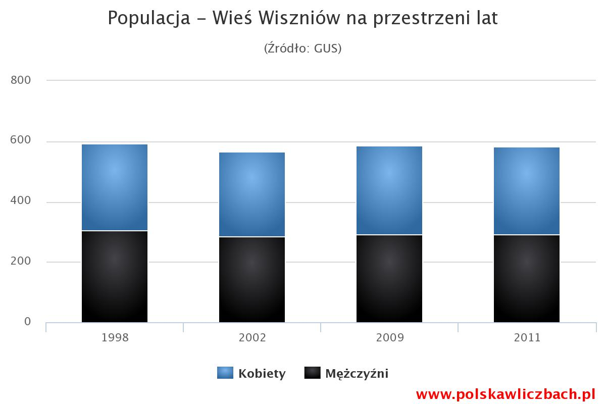 Wykres ludności